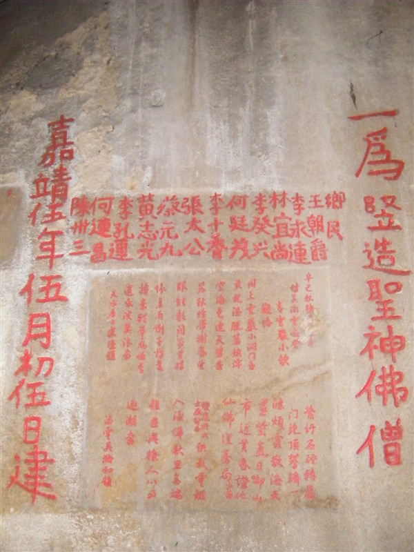 达濠青云岩 石刻 嘉靖五年